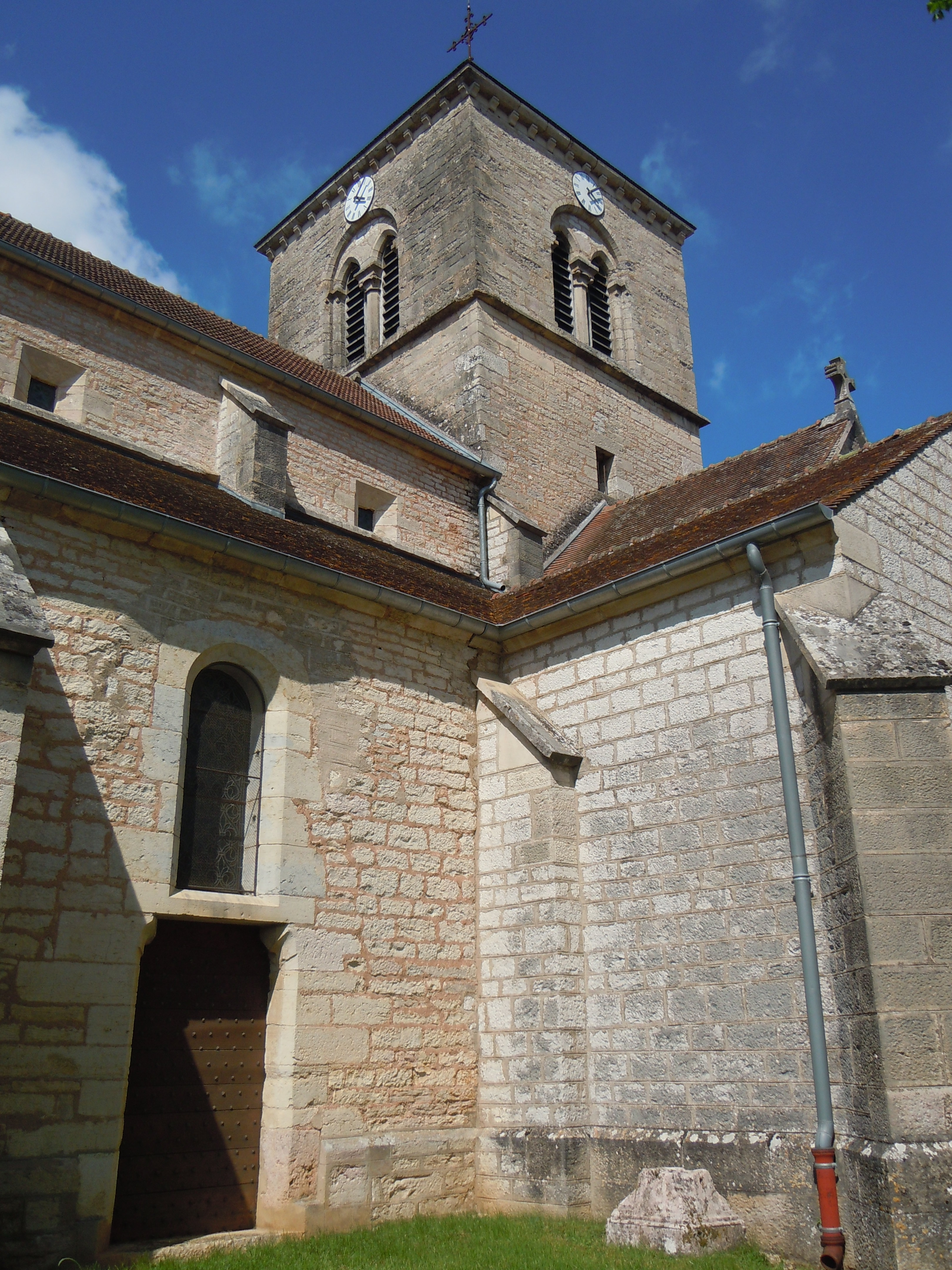 Clocher de l'église Saint-Jean-Baptiste de Fleurey-sur-Ouche